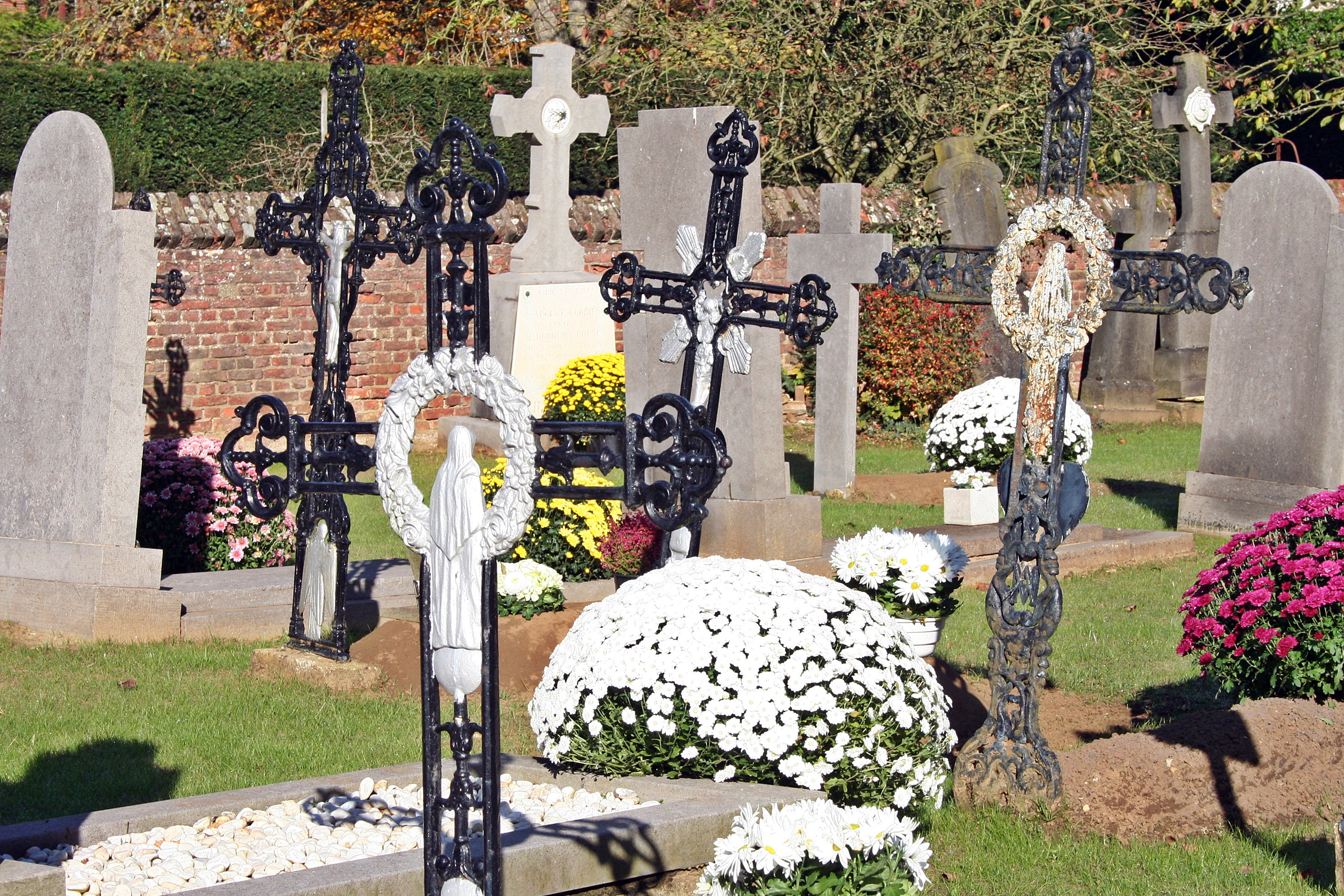 Algemeen aspect van het kerkhof aan de Sint-Pieterskerk (Langdorp)